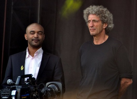 Dominique Sopo et Elie Chouraqui au concert pour l'égalité de SOS Racisme